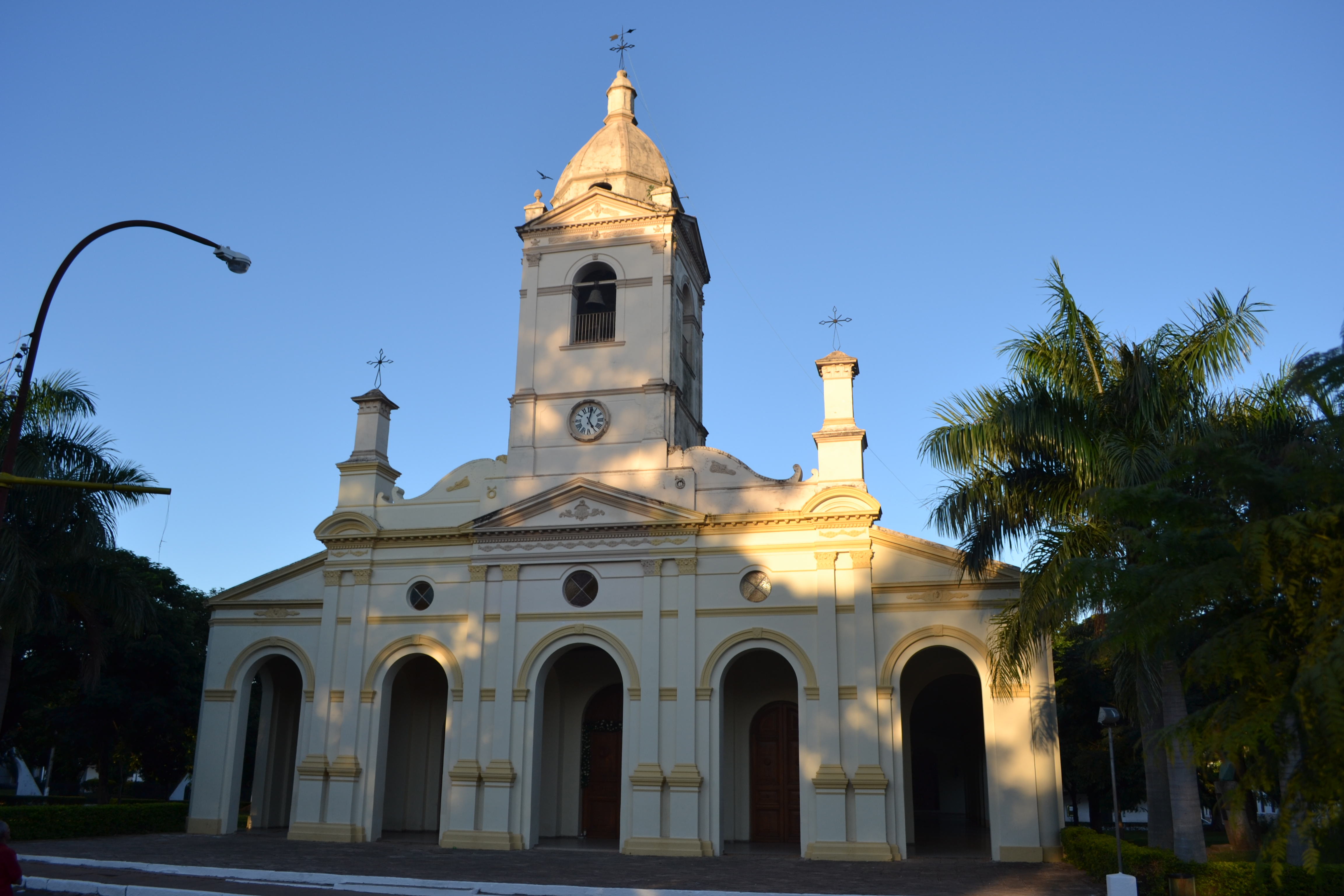 Catedral de Villarrica, Paraguay